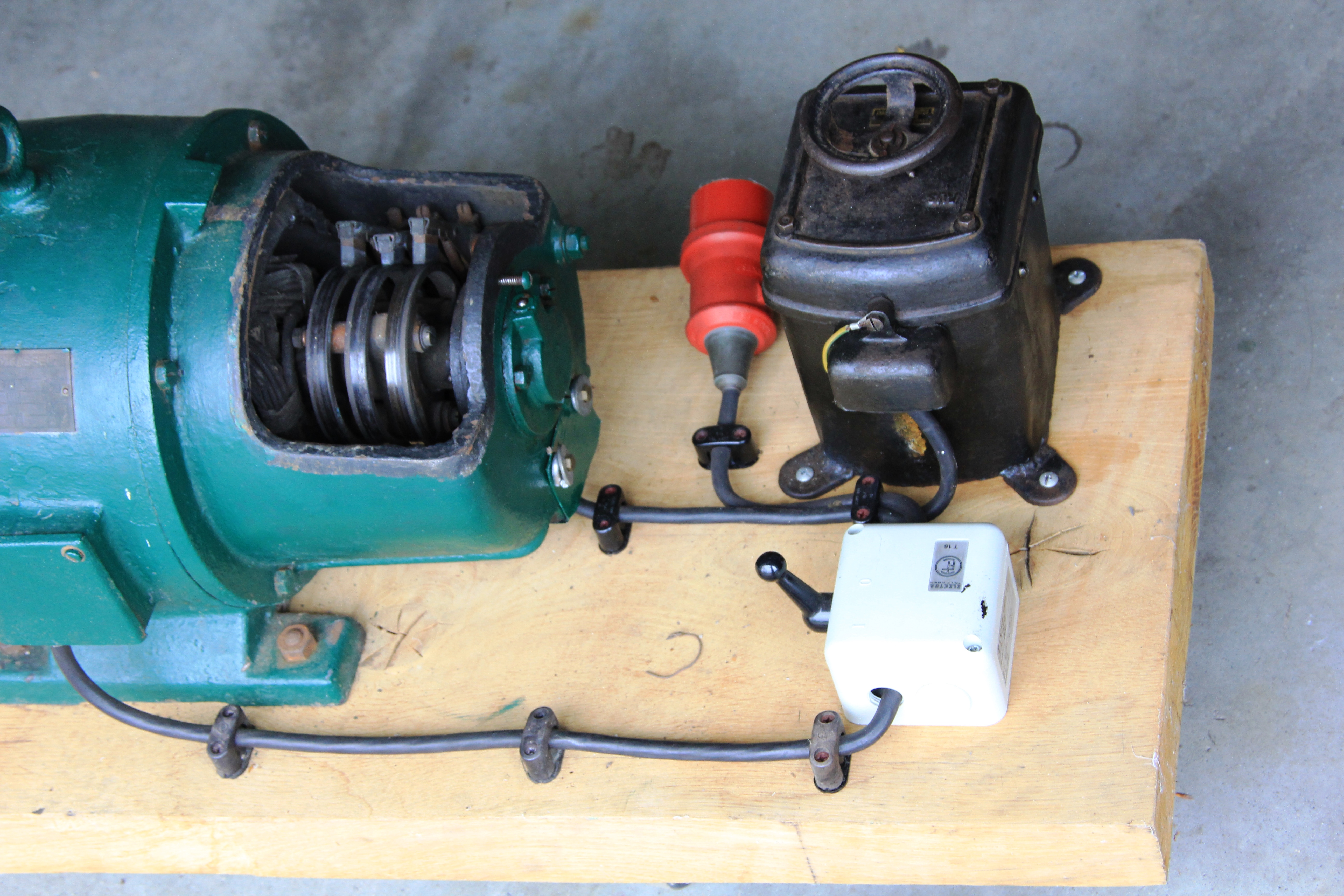 Historischer Drehstrom-Schleifringläufermotor mit 4 PS (2,9 kW) von KATT & Co., Kassel. Wahrscheinlich 1930er-Jahre, bereits kugelgelagert. Motor (grün-blau), Schalter (weiß), CEE-Stecker für 16A und Anlasswiderstand (schwarz). Mit geöffnetem Schleifringapparat.